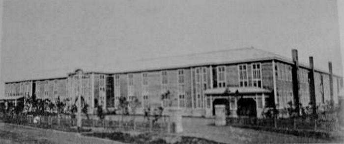 Средняя школа в Оодомари, открытая в 1936 году. После войны и до 1963 - корейская семилетняя школа г. Корсаков (Сахалинская область)